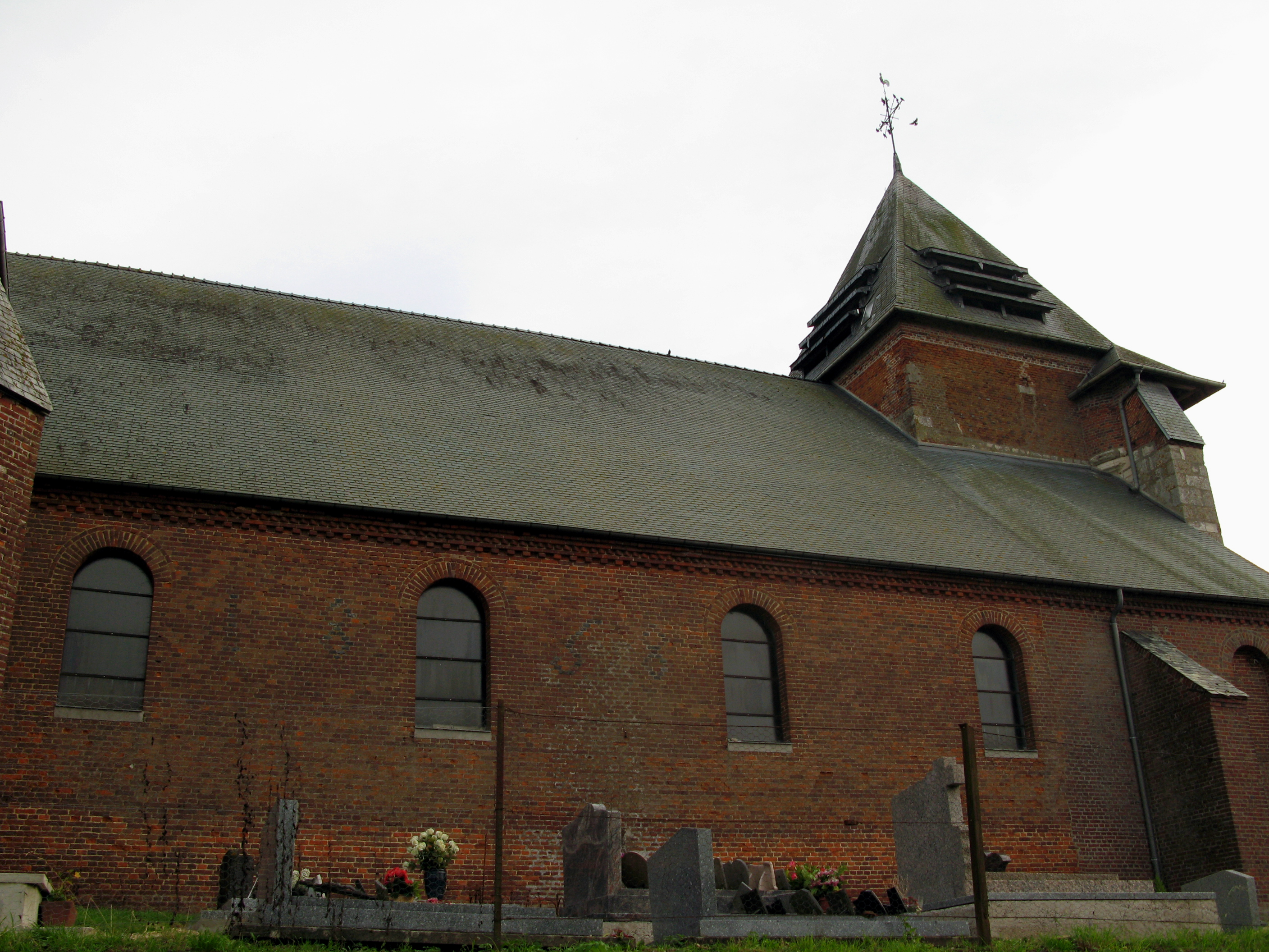 Fraillicourt (Ardennes, France) La façade nord de l'église fortifiée. On remarque (assez difficilement, il est vrai) une date inscrite en briques vitrifiées ou plus sombres : 1858. Le "1" et le "8" sont à gauche d'une fenêtre, et le "5" et le "8" à droite. This building is indexed in the Base Mérimée, a database of architectural heritage maintained by the French Ministry of Culture, under the references PA00078439 and Classé .